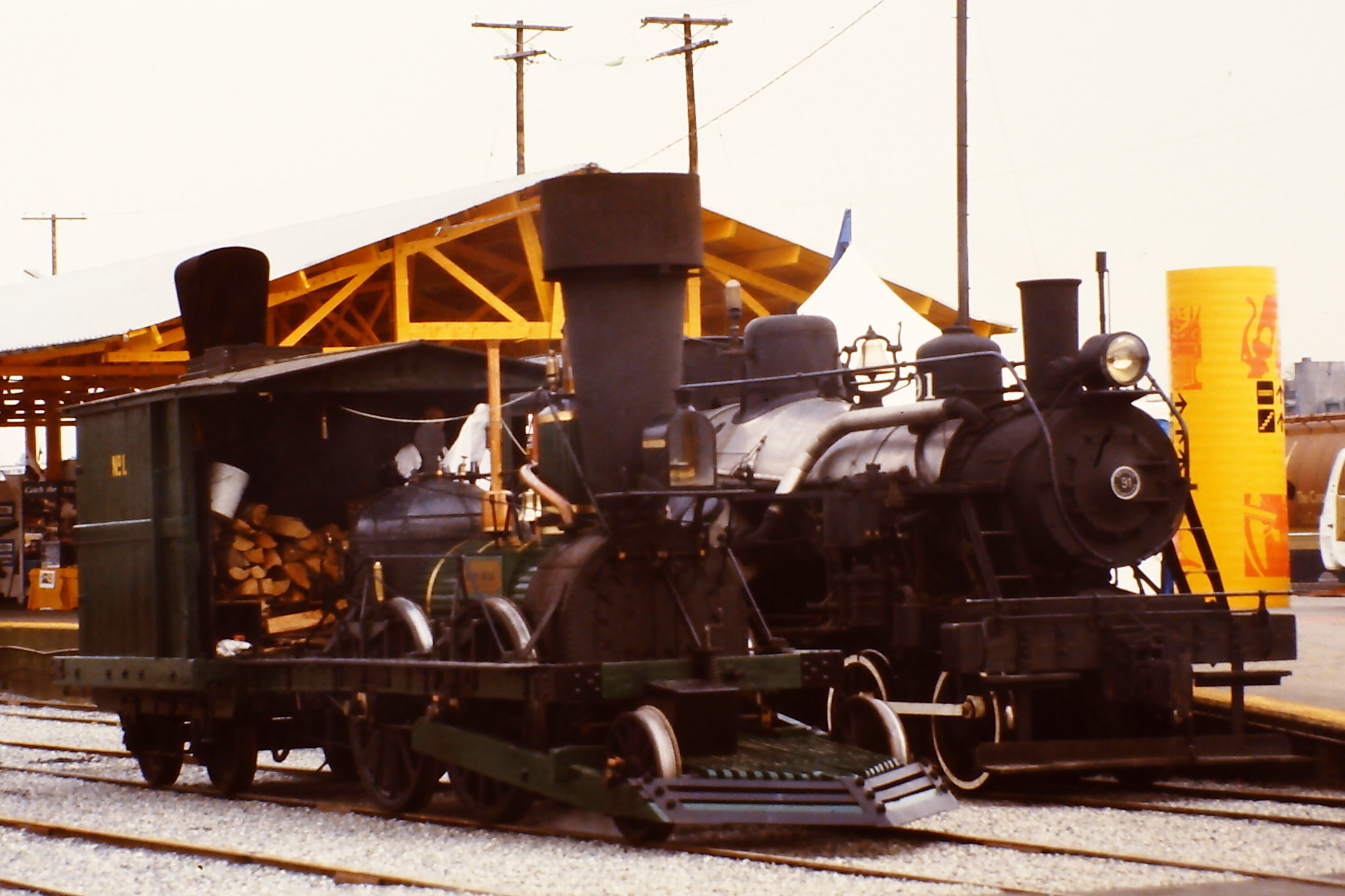 Dampflokomotive „John Bull“ (Replikat) auf der SteamExpo 86